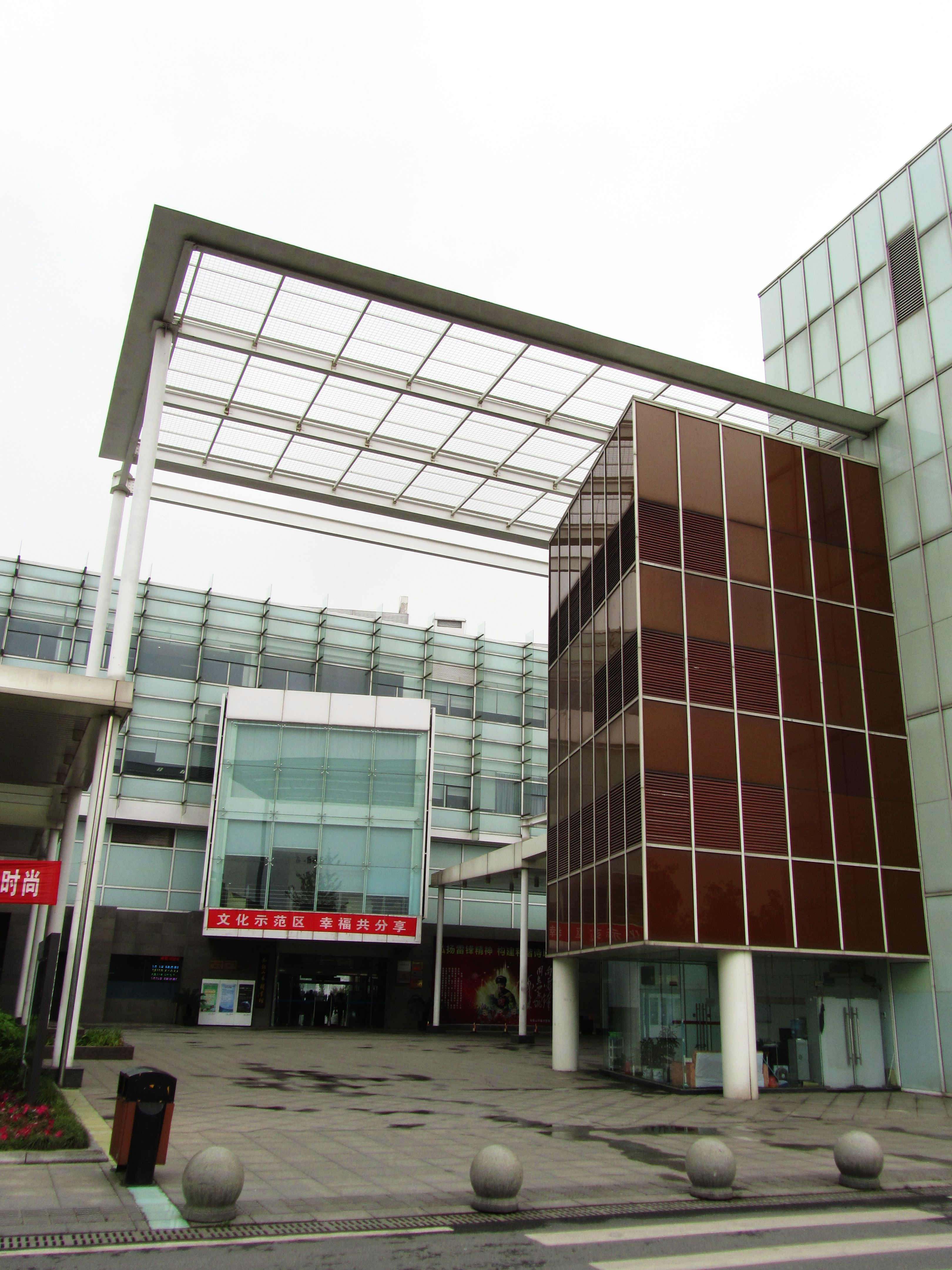 马鞍山市图书馆，北面门廊。